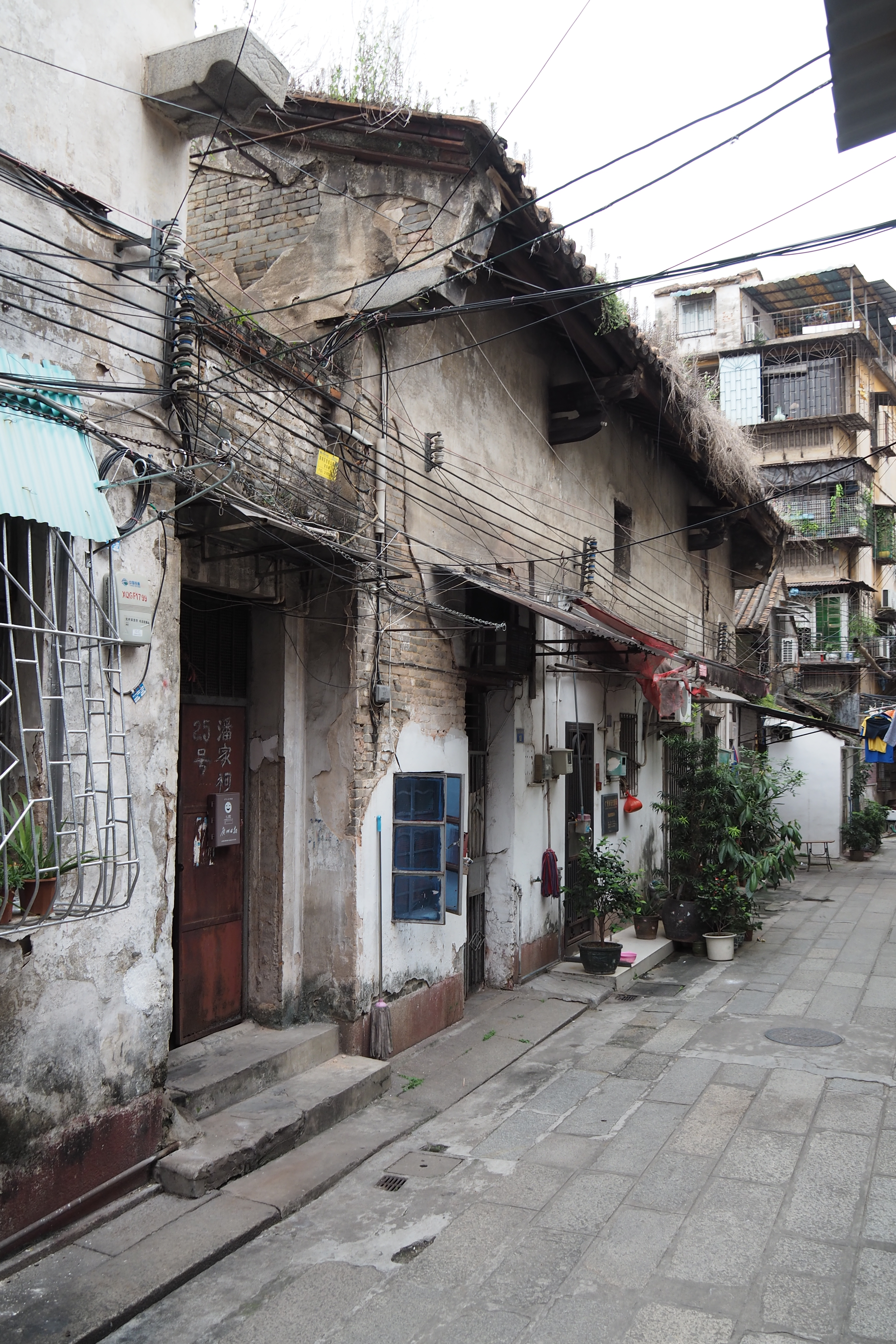 中文（中国大陆）: 位于广东省广州市海珠区同福西路潘家祠道1、2、5、6、8、10、13、13-1、14、15号。